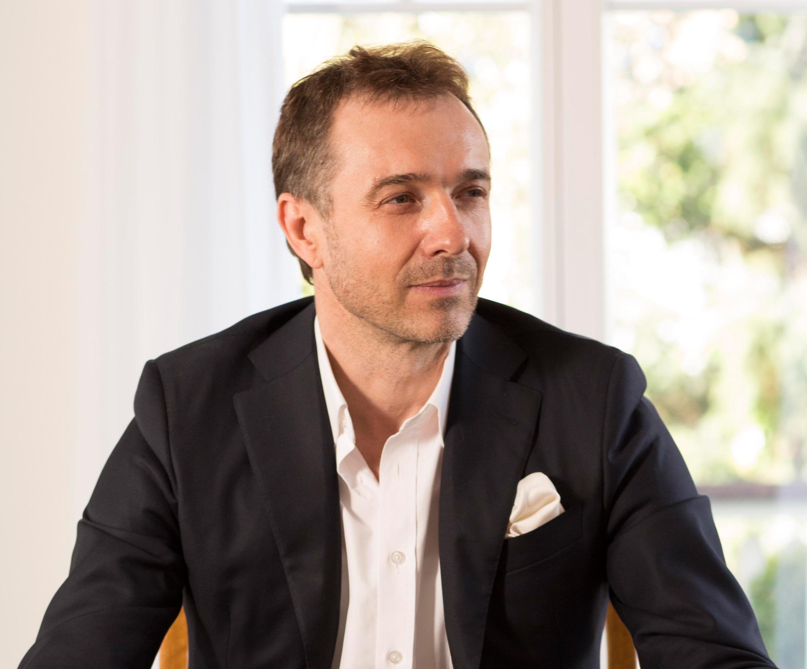 Guido Fluri 2014